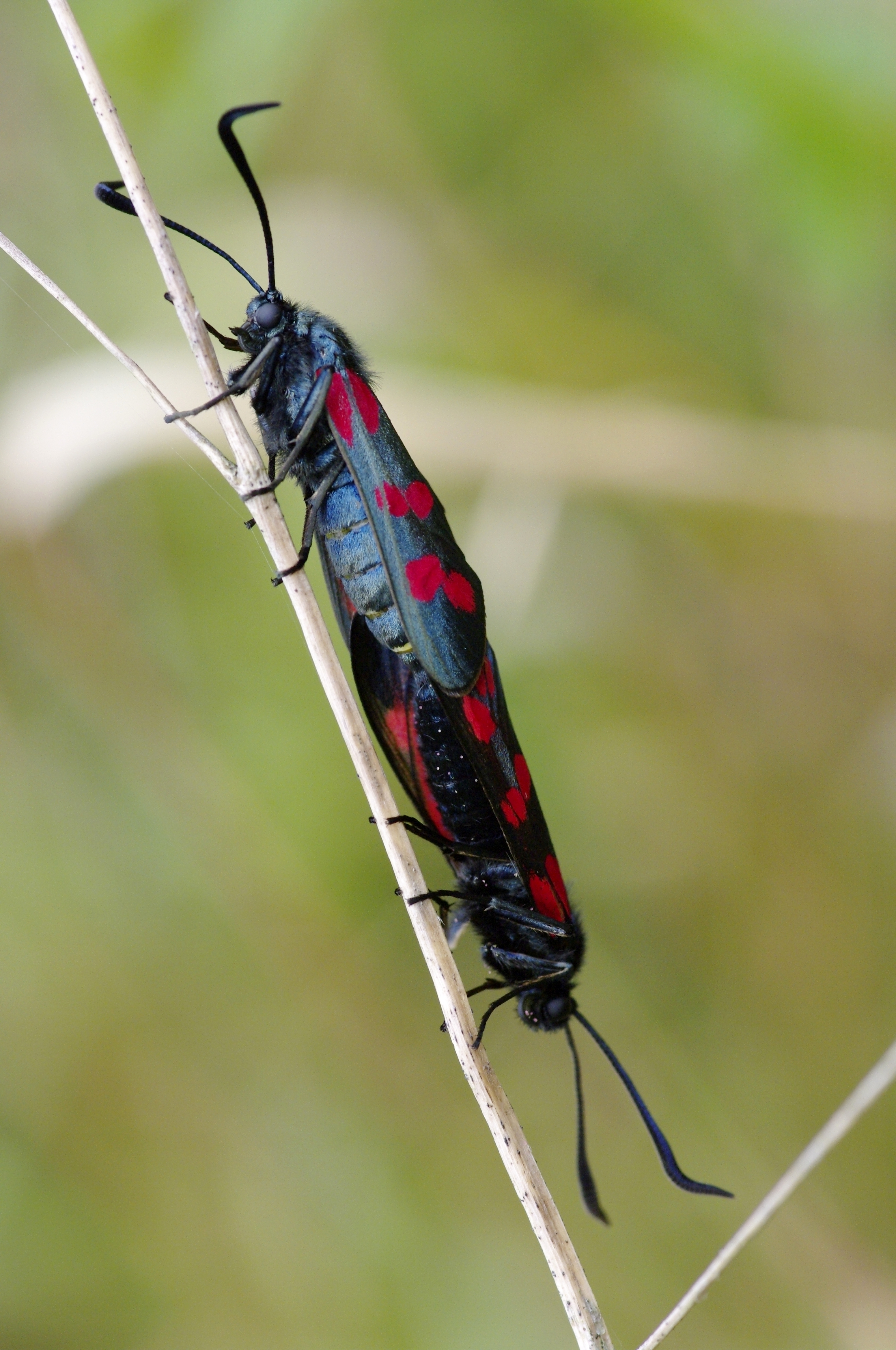 Un accouplement de Zygènes de la spirée ou filipendule, en Normandie.